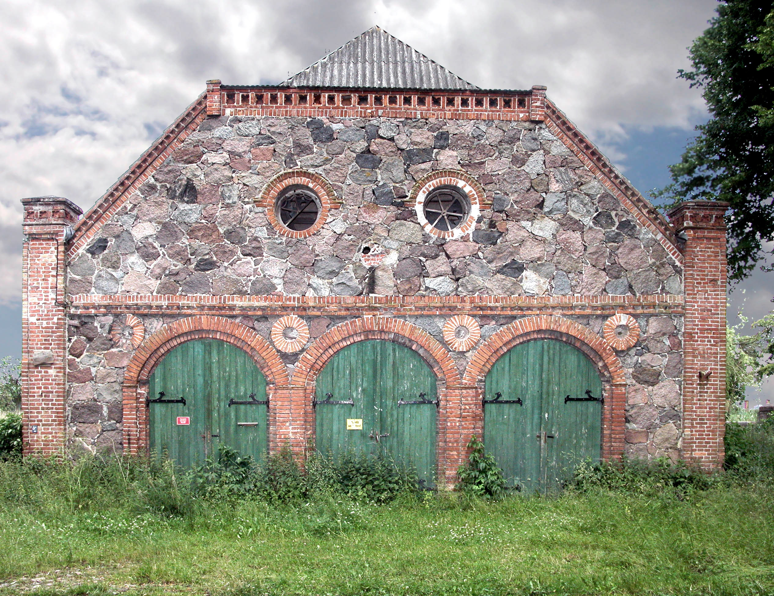 24.06.2004 17129 Kartlow (Gem. Kruckow): Neben dem Schloß befinden sich die Wirtschaftsgebäude des Ritterguts. Bemerkenswert ist die sorgfältige Ausführung in Bruchsteinmauerwerk, das an den Ecken und Gewänden von Ziegelmauerwerk gefaßt wird. [DSCN4150.JPG]20040624860DR.JPG(c)Blobelt